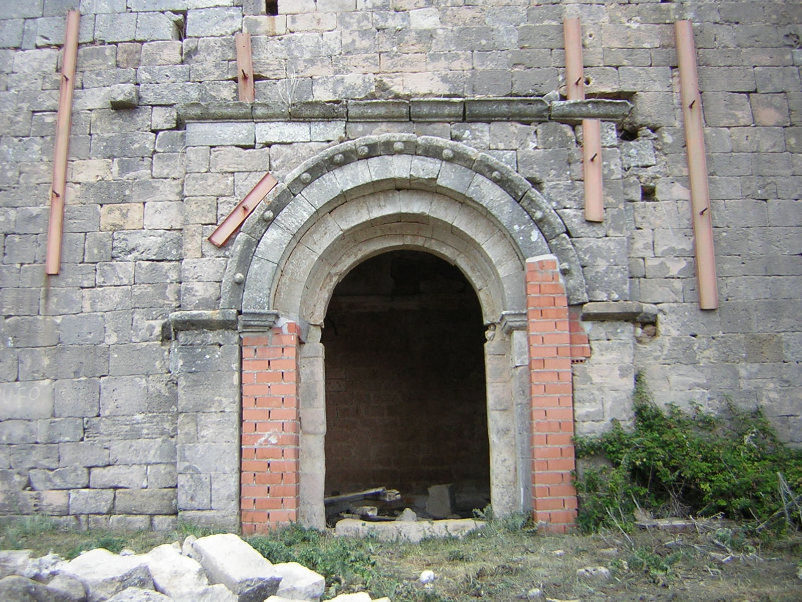 Iglesia románica de Villaescusa de Palositos (Guadalajara-España). Declarada Bien de Interés Cultural en junio de 2012 por la Junta de Castilla-La Mancha, con la categoría de Monumento. Su estado de deterioro y abandono hace presagiar que no tardará en desplomarse. En un sillar está grabado el nombre de su autor “Gilem”. El resto de sillares está destinado a grabar el nombre de los que, con su falta de apoyo real al Patrimonio Histórico, están provocando su desaparición para generaciones futuras.